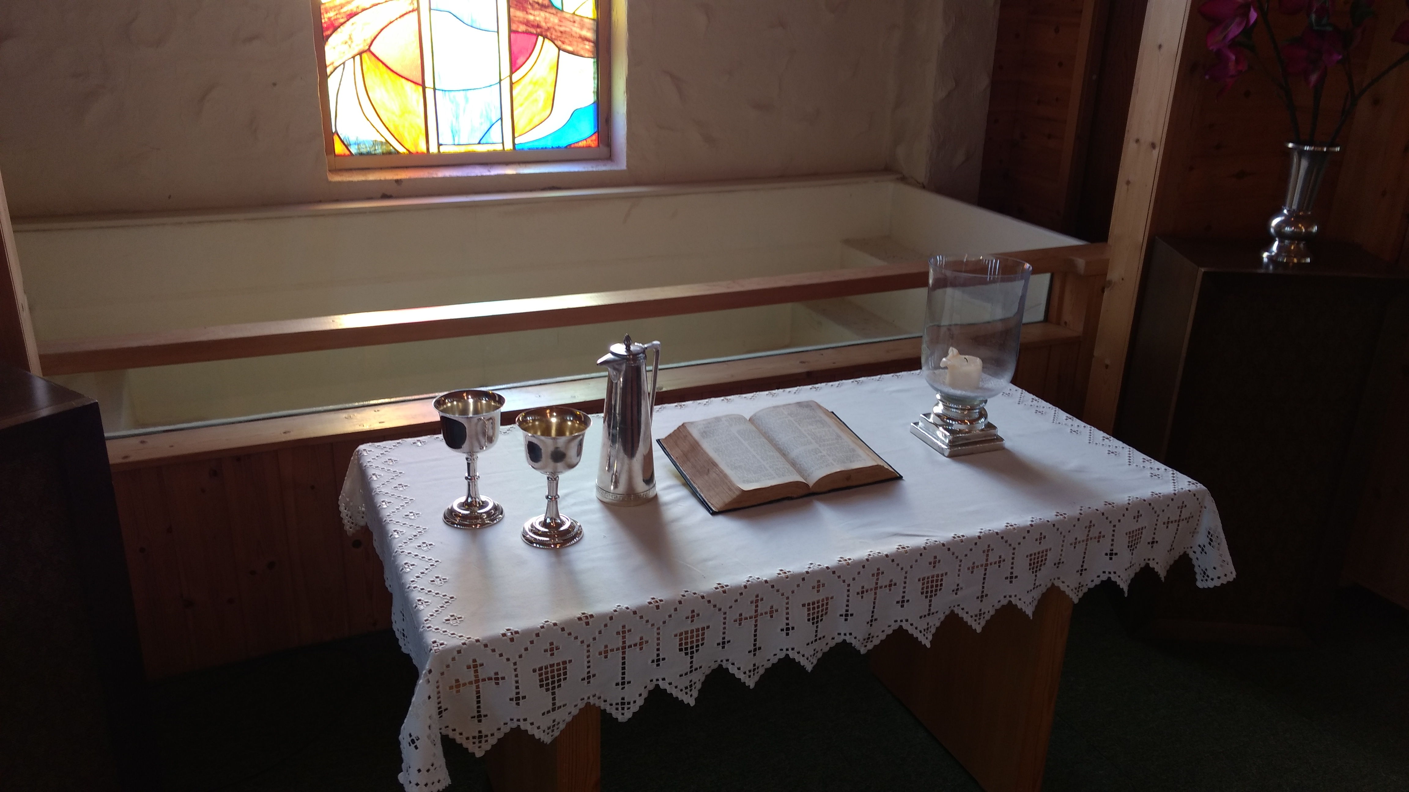 Altar and baptismal pool at Sommarøy baptistkirke, Tromsø